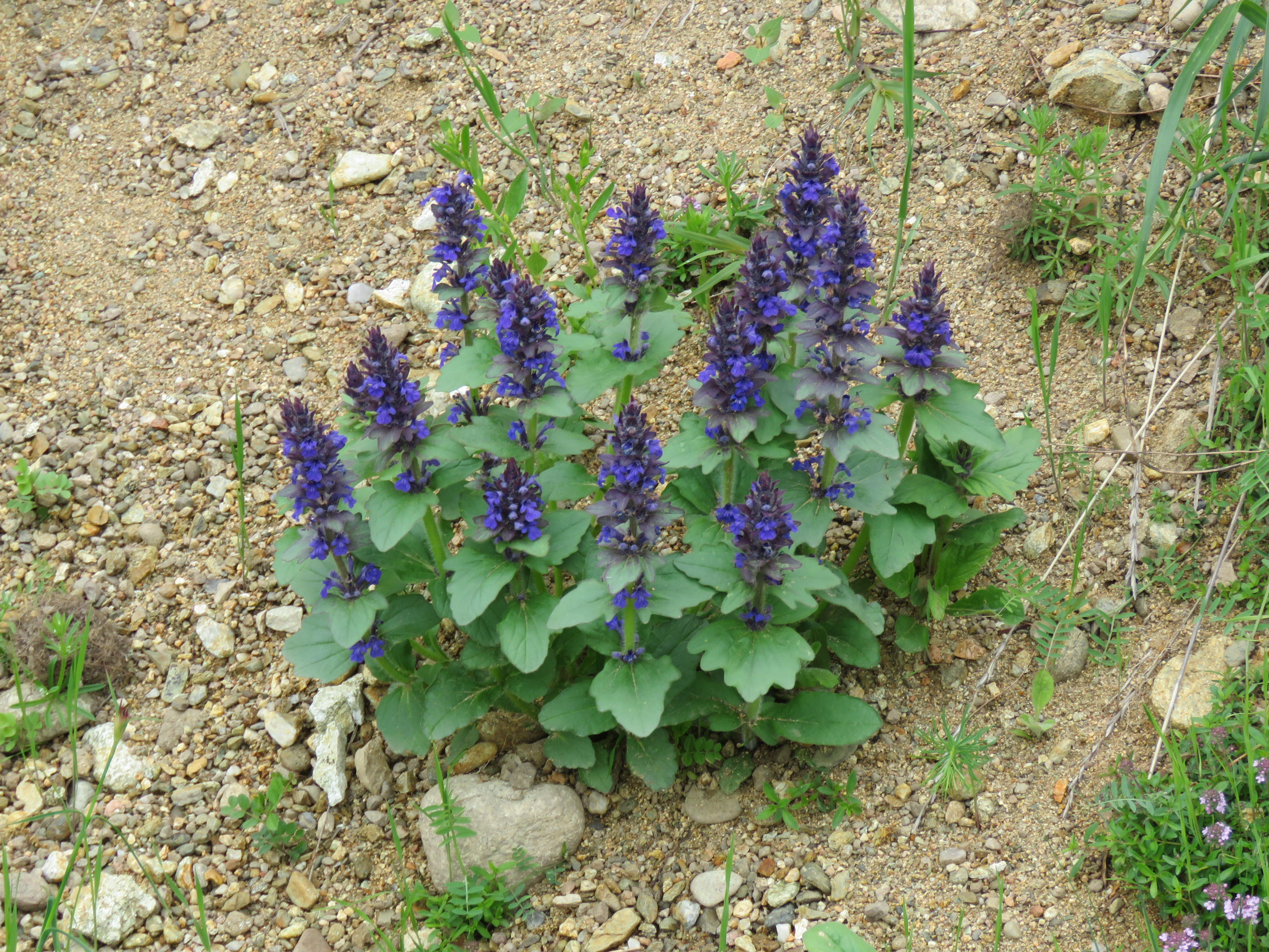 Srpski (latinica): Flora Nacionalnog parka Đerdap, Srbija